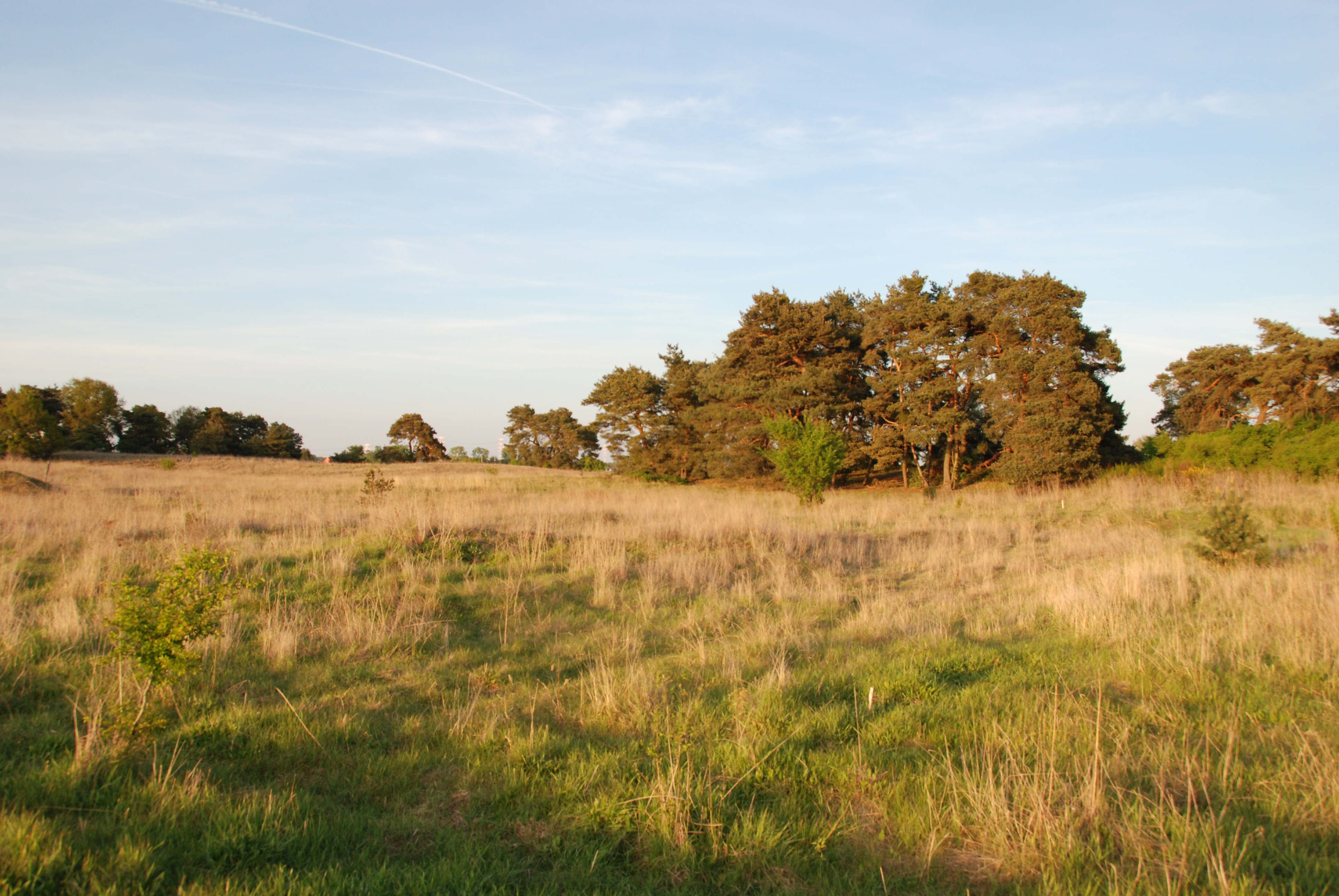 Rotböll Gräfenhausen